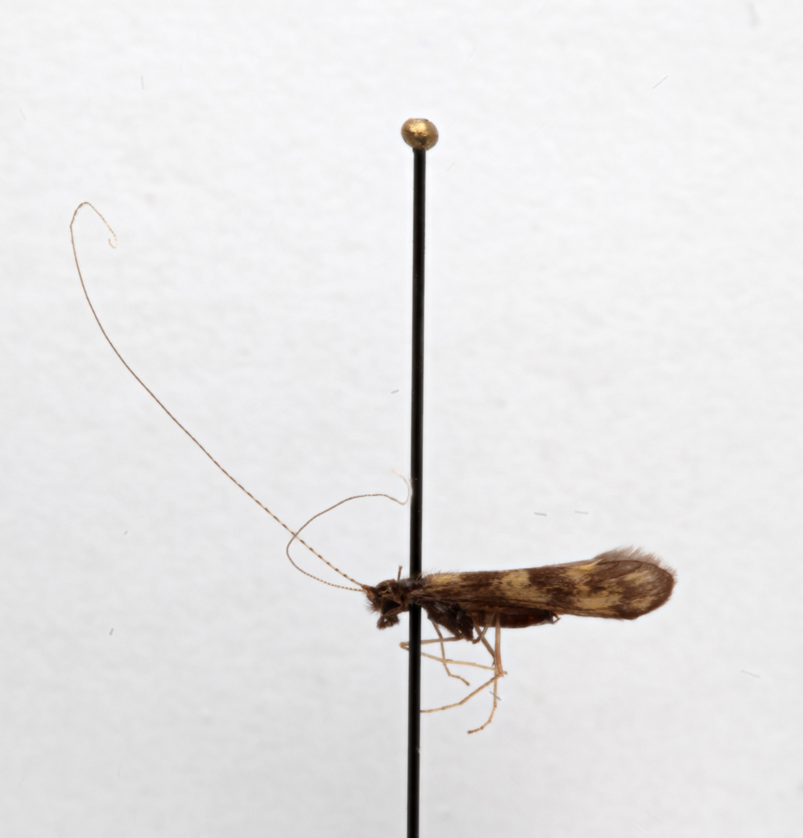 NHRS-KAJO 000003518 late